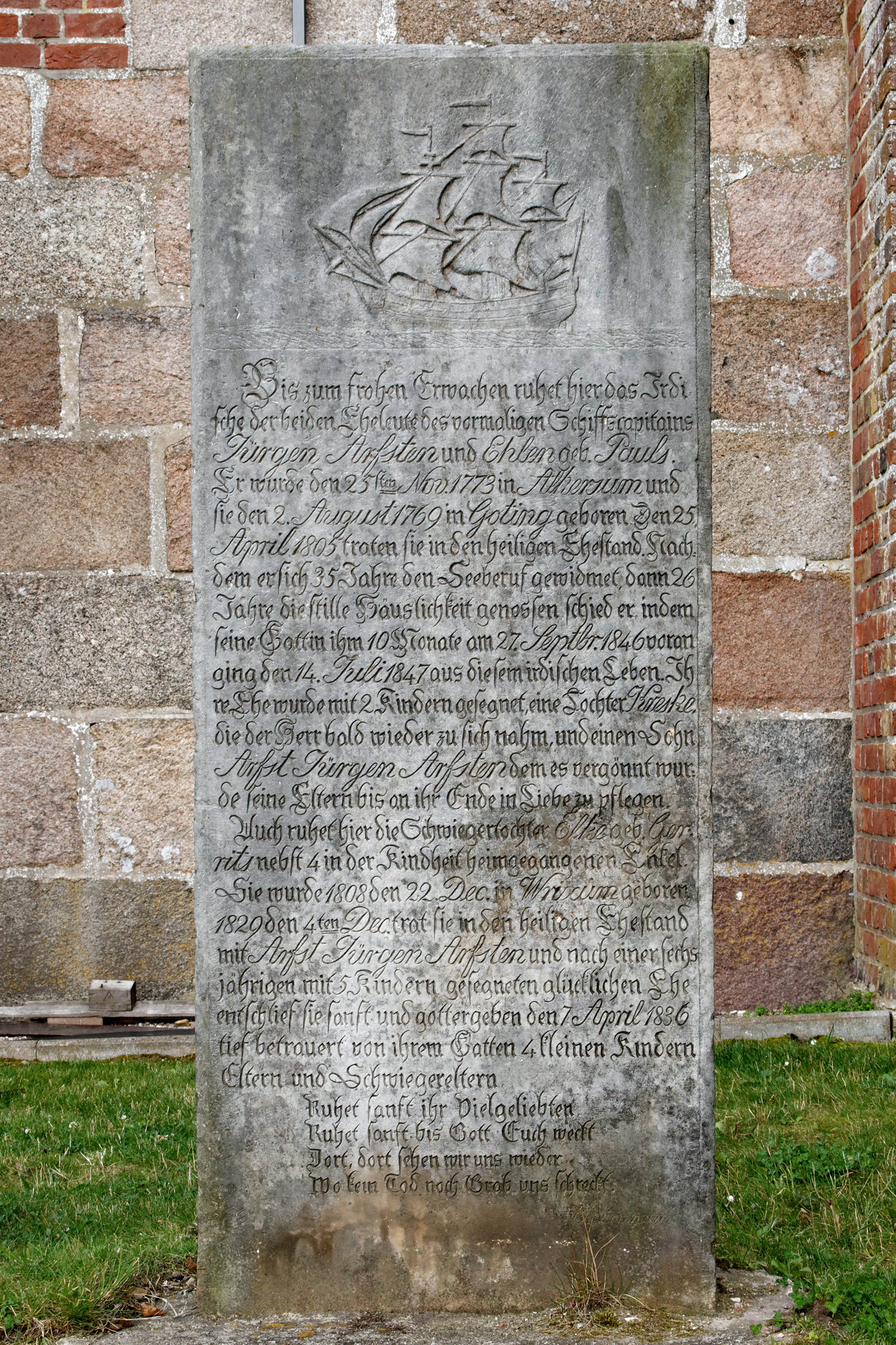 Grabstein des Kapitäns Jürgen Arfsten (1773-1847) und Ehefrau Ehlen geb. Pauls (1769-1846) auf dem Friedhof der Kirche St. Johannis in Nieblum, Insel Föhr.